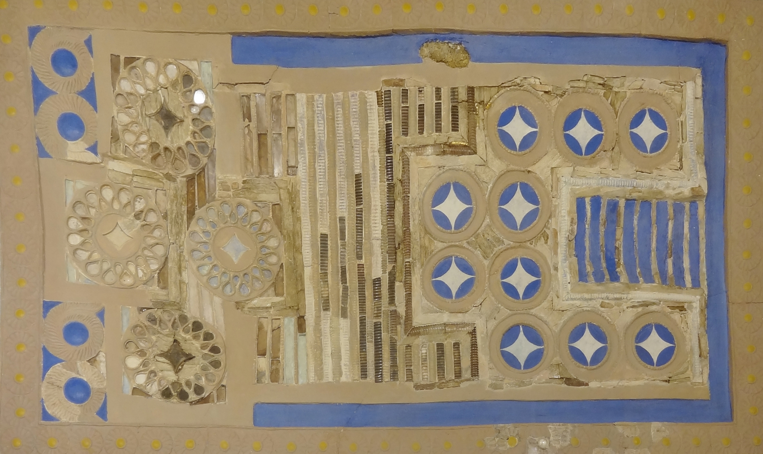 Minoisches Spielbrett (Neupalastzeit, 1600–1500 v. Chr.) aus Knossos, ausgestellt im Archäologischen Museum Iraklio, Kreta, Griechenland